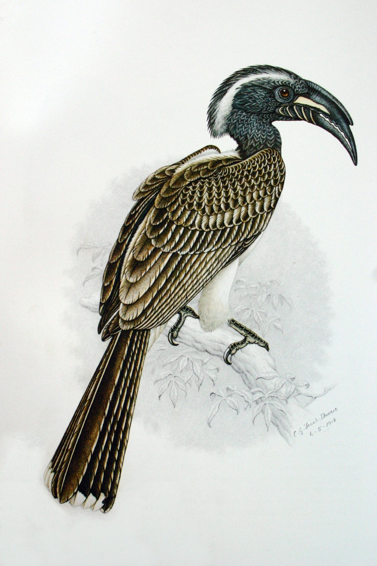 Grey Hornbill (Tockus nasutus) (adult male)